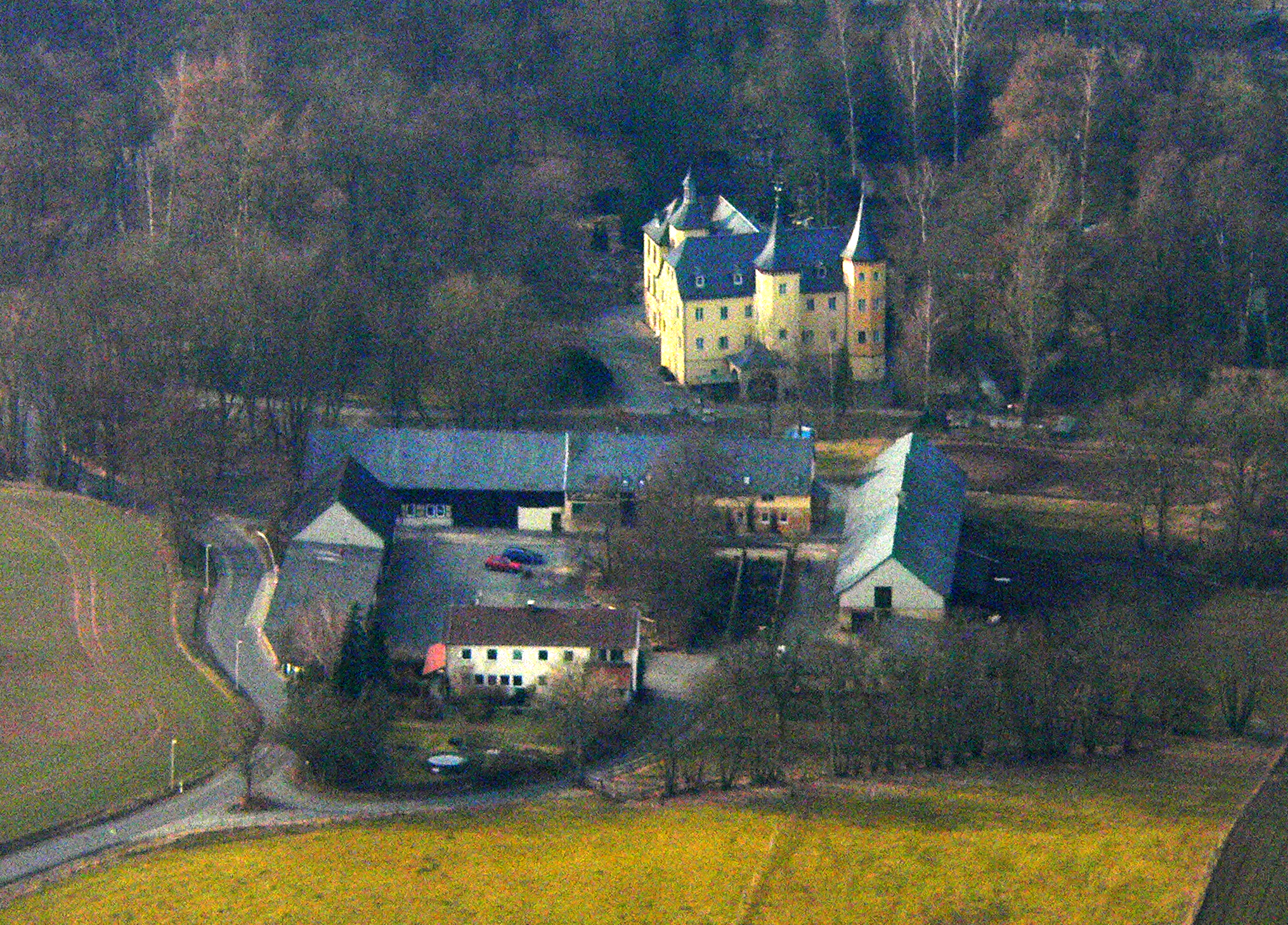 Schloss Neuhof bei Coburg, Oberfranken, Bayern